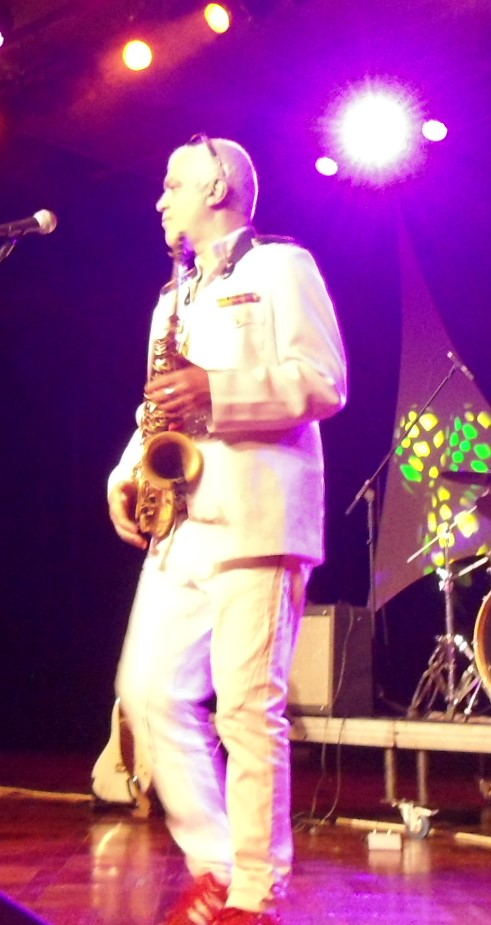 Der Saxophonist Philippe Sellam auf dem Jazzfestival St. Ingbert